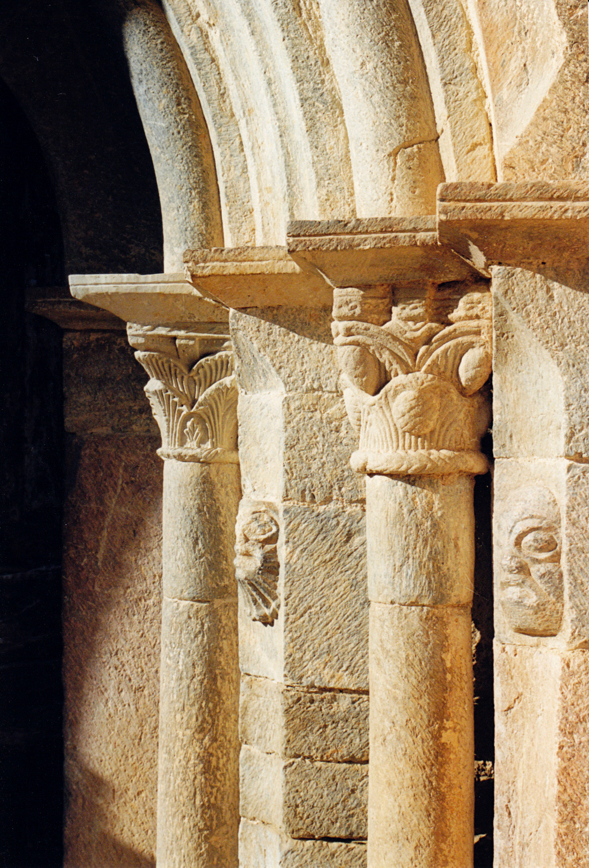 Espagne - Catalogne - Basse-Cerdagne - Isòvol - Église Saint-Pierre d'Olopte